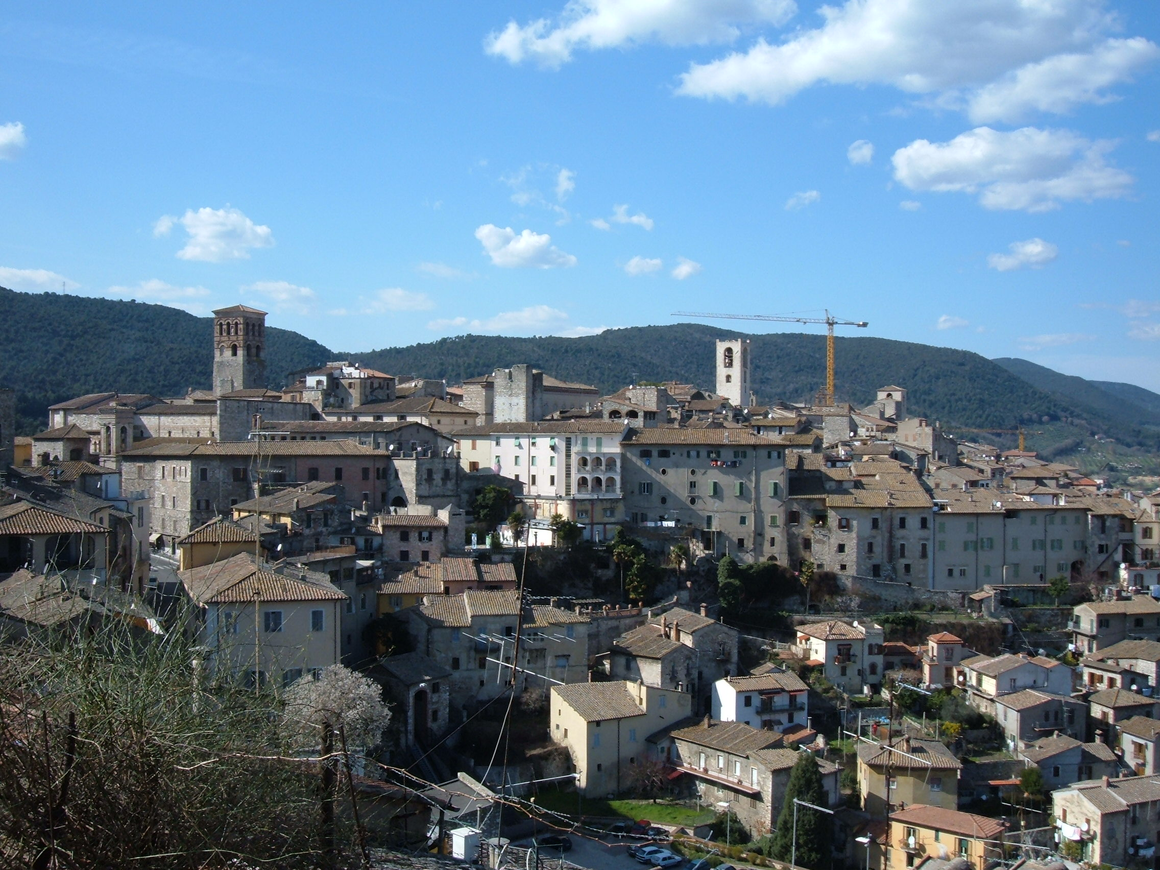 Panorama di Narni dalla chiesa di Santa Margherita.